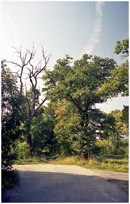 Alej u katastrálního dubu u Hradku u Pardubic